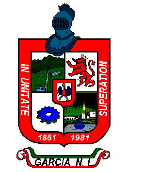 Escudo de armas Garcia